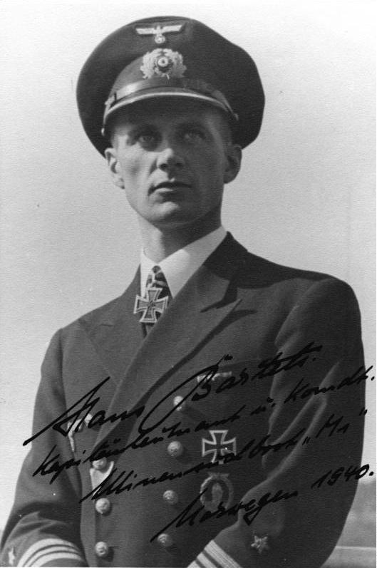 [Foto mit Unterschrift:] Hans Bartels. Kapitänleutnant und Kommandant Minensuchboot "M1" Norwegen 1940